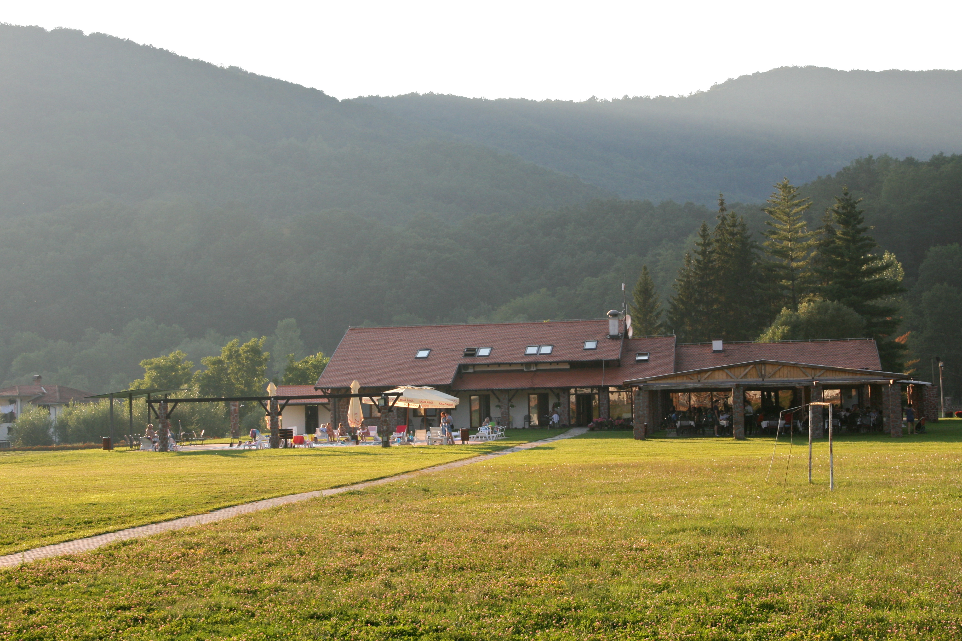 Поточара у окружењу - Сисевац